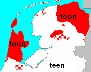 eigenkaart